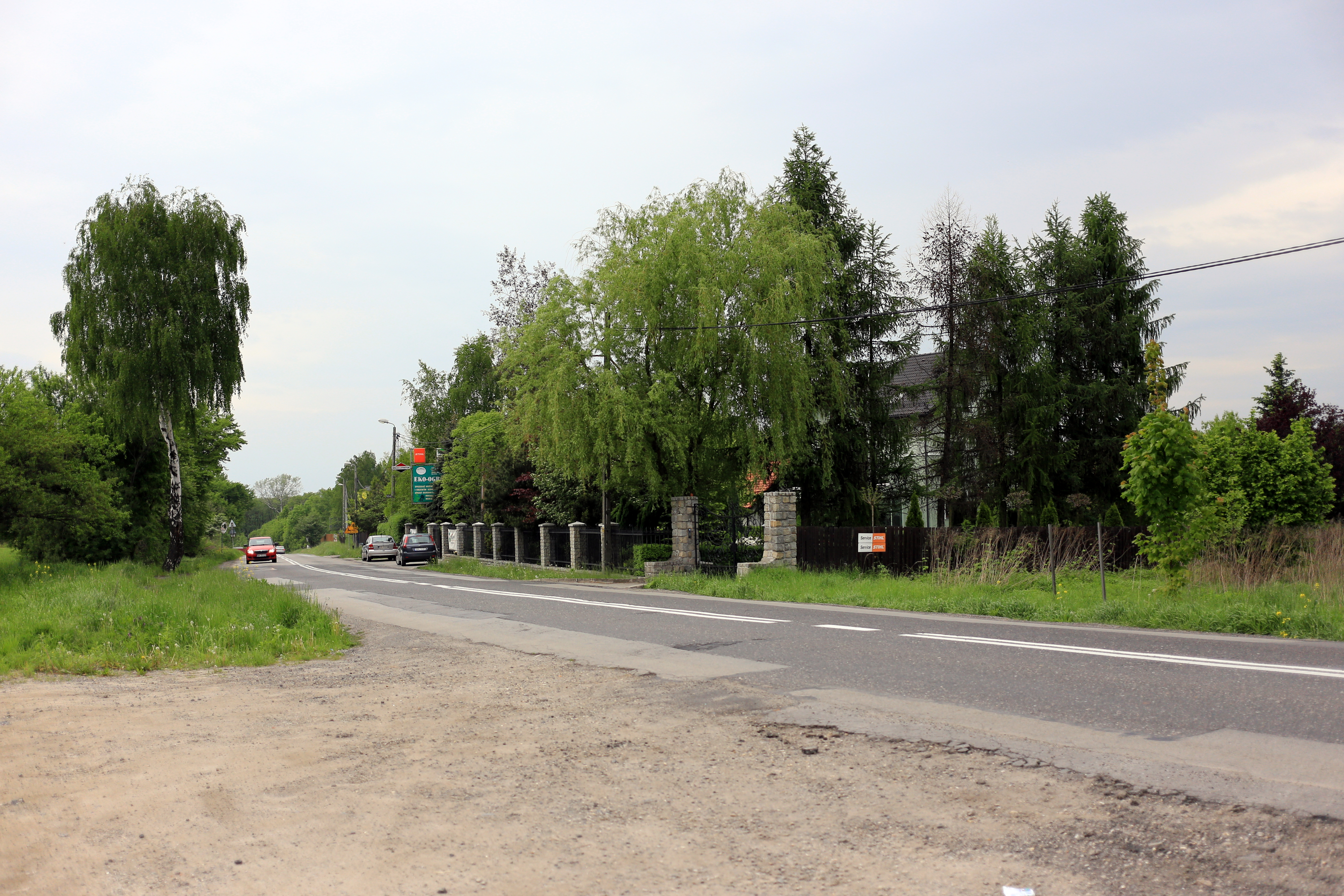 Niedaleko Gliwic